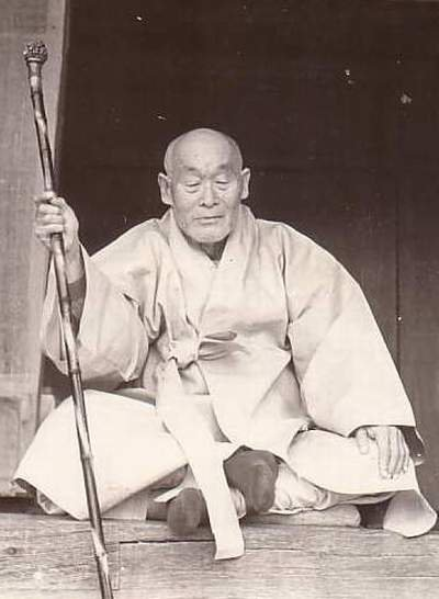 Thiền sư Hàn Quốc cận đại.